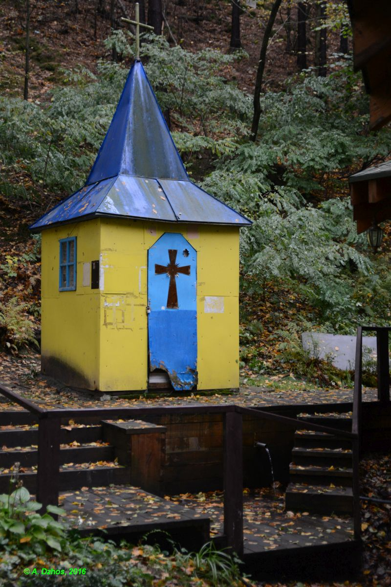 Дзвінкова криниця, Вишгородський район, Новопетрівська сільська рада